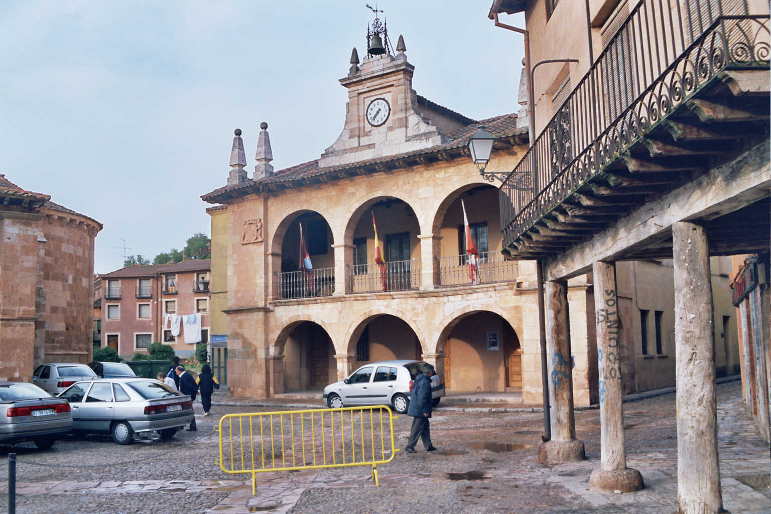 Segovia. (Castilla-León. España) Ayllón. Ayuntamiento. Fotografía realizada el 25 agosto de 2002 por el autor. User:Pelayo2